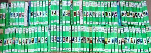 'Varia' Bibliothèque verte (60 titres).